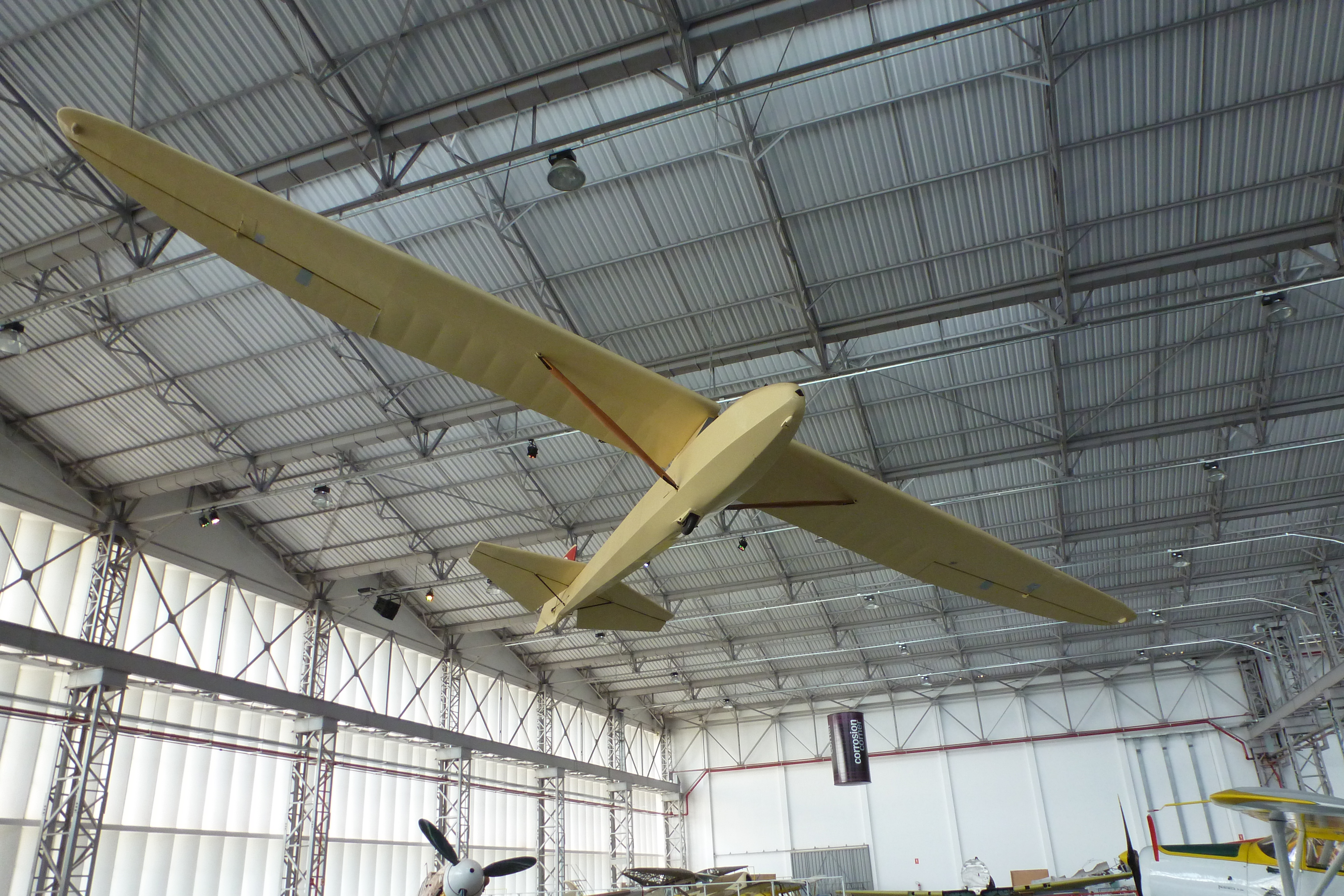 Visita ao Museu da TAM, em São Carlos, no Brasil.